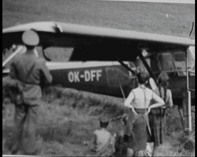 Lietadlo Storch po úspešnom pristáti v Rakúsku